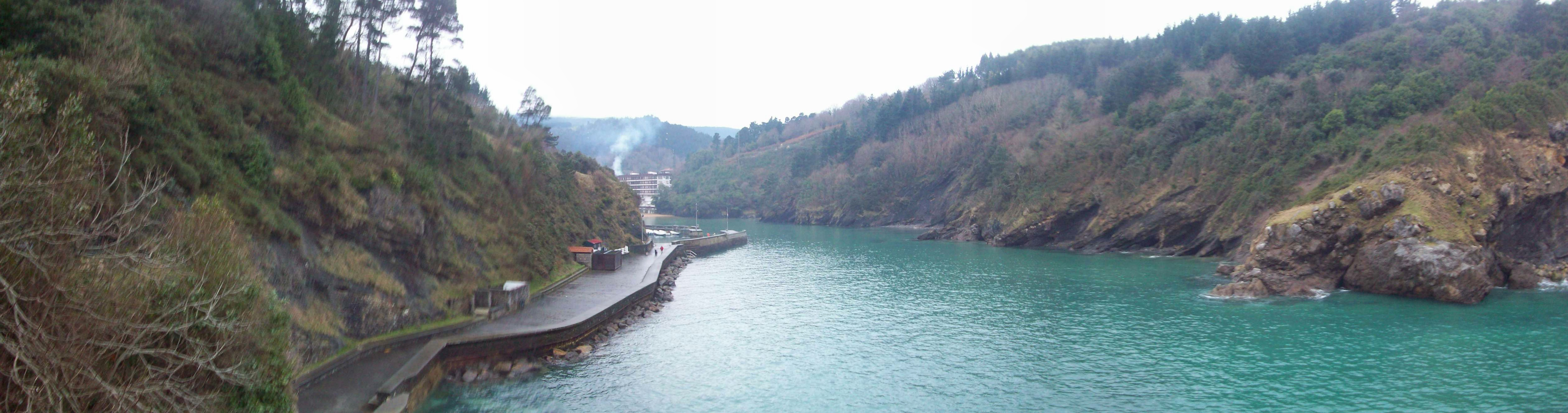 Ea. Bizkaia, Euskal Herria. Ea. Biscay, Basque Country.